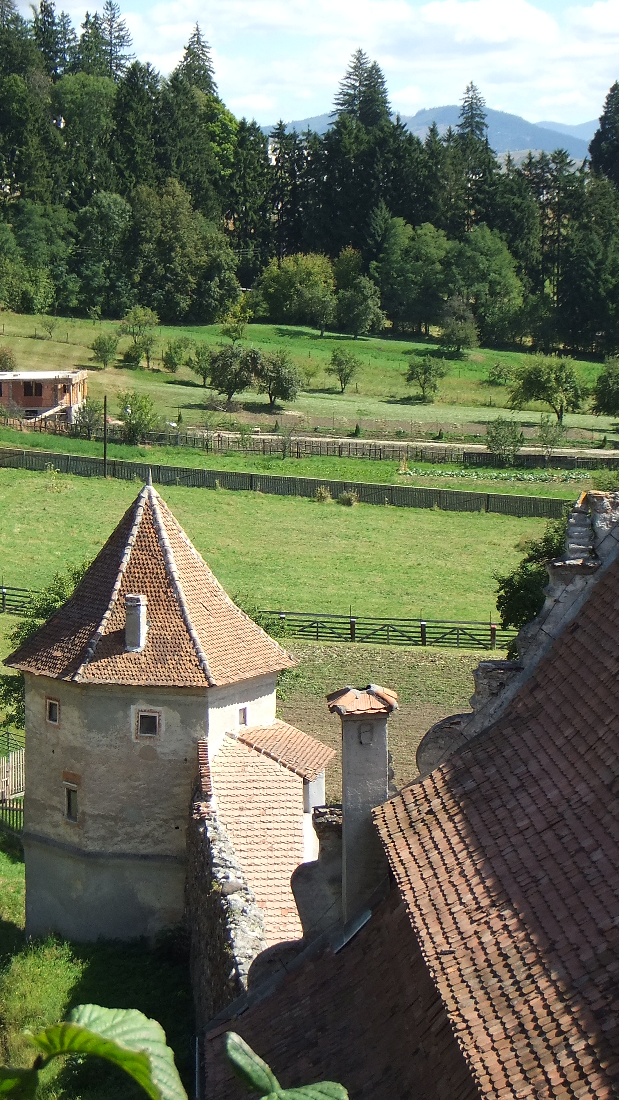 Bastion 07